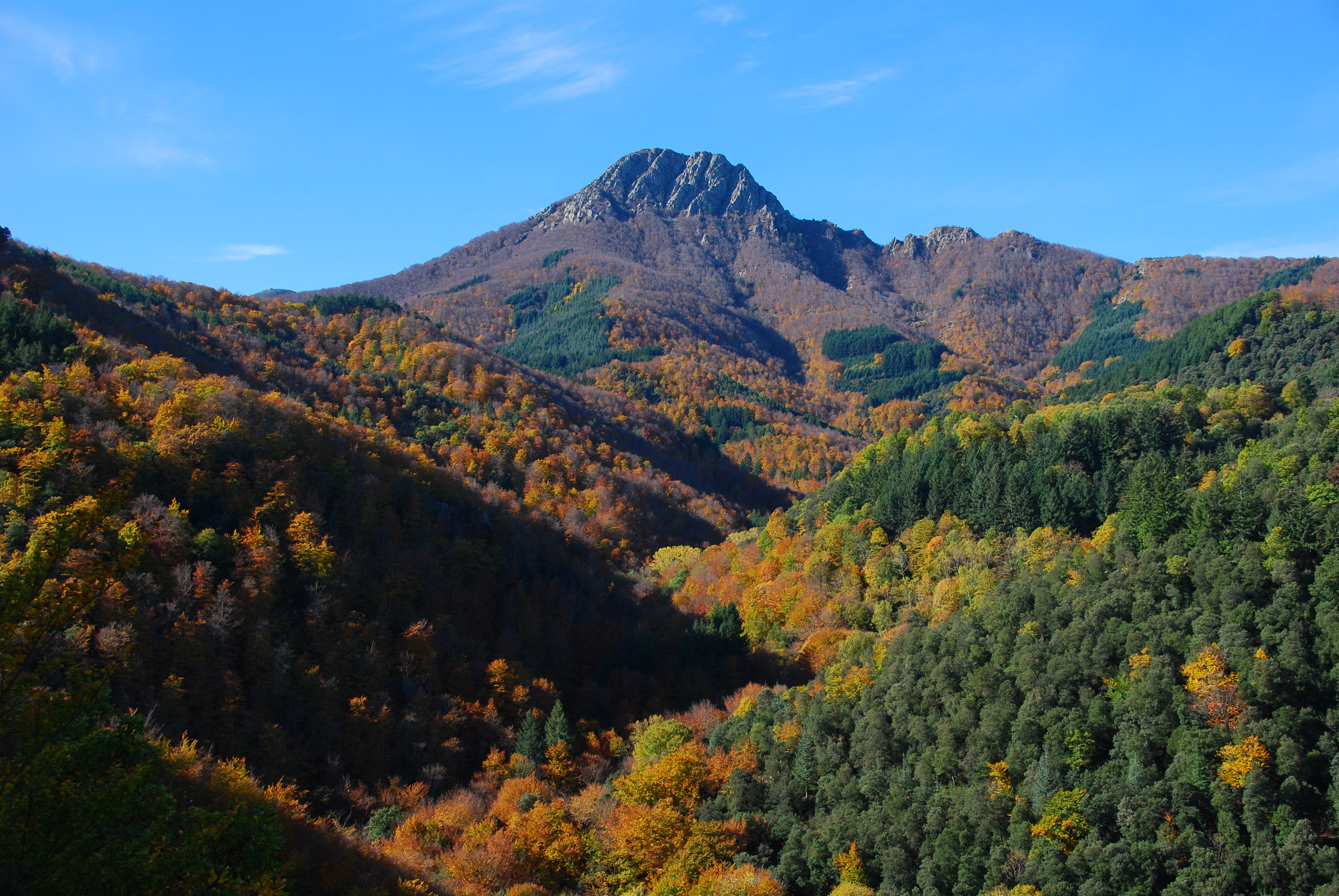 LES AGUDES . De Arbucies a Santa Fe, per Coll de Te. Massís del Montseny This is a photography of a Site of Community Importance in Spain with the ID: ES5110001. Natura2000 entry, EEA entry